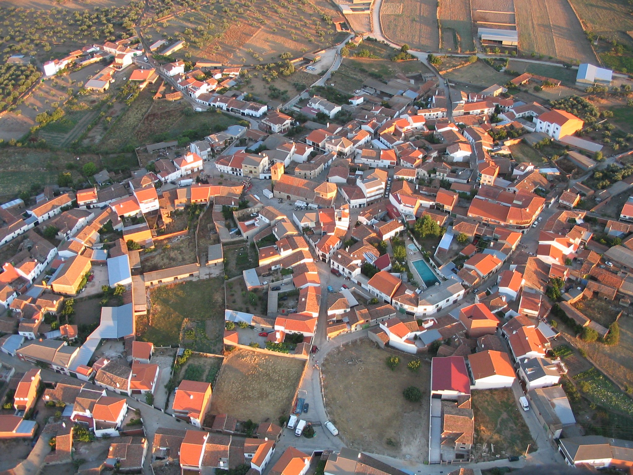 Fotografía aérea de Mohedas de la Jara desde el cielo.